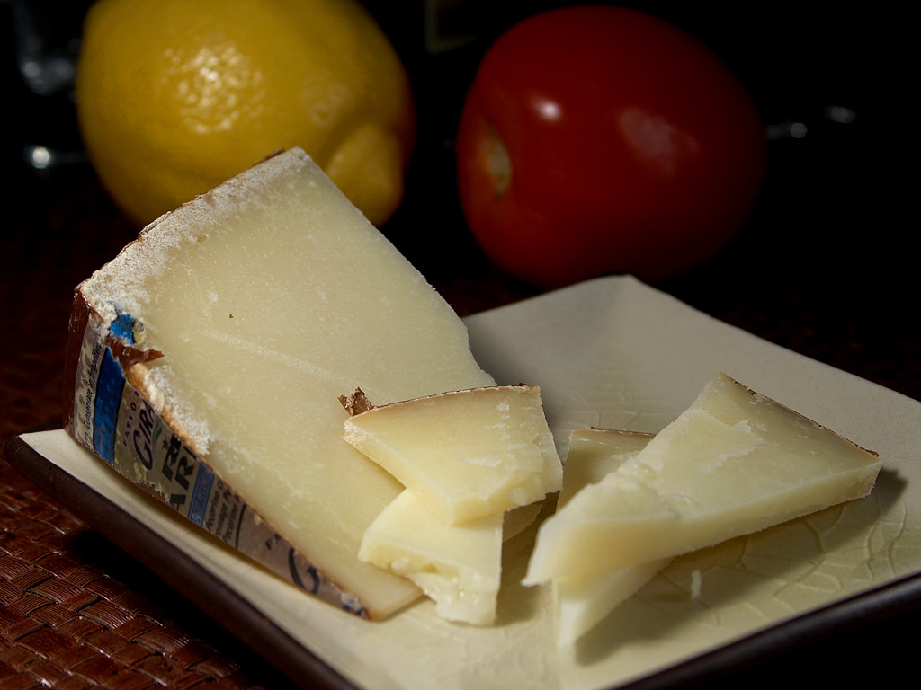 Pecorino Sardo Cheese